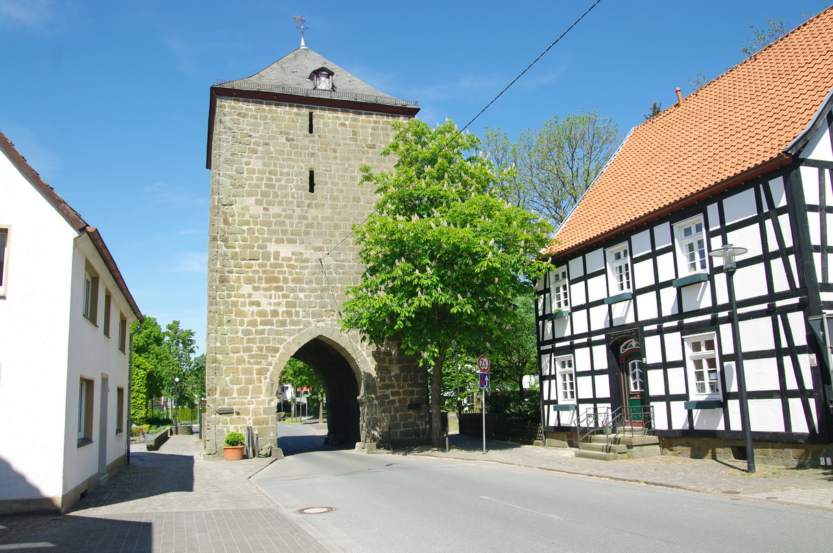 Hachtor in Rüthen